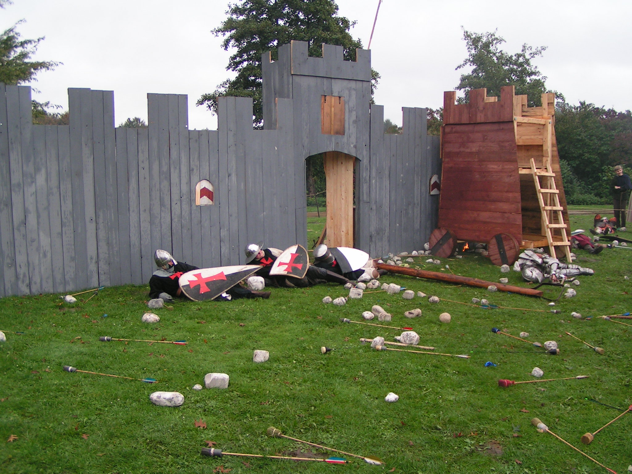 Burgmannentage im Zitadellenpark Vechta - Ende einer "Schlacht"